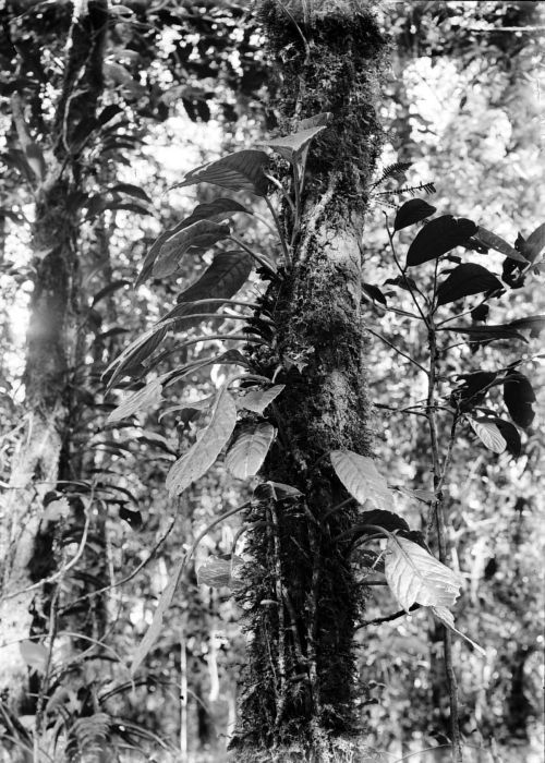 Repronegatief. Agalmyla parasitica, Tjibodas